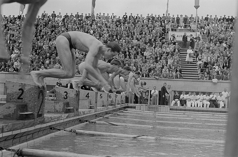 Original image description from the Deutsche Fotothek Start Schwimmen der Männer